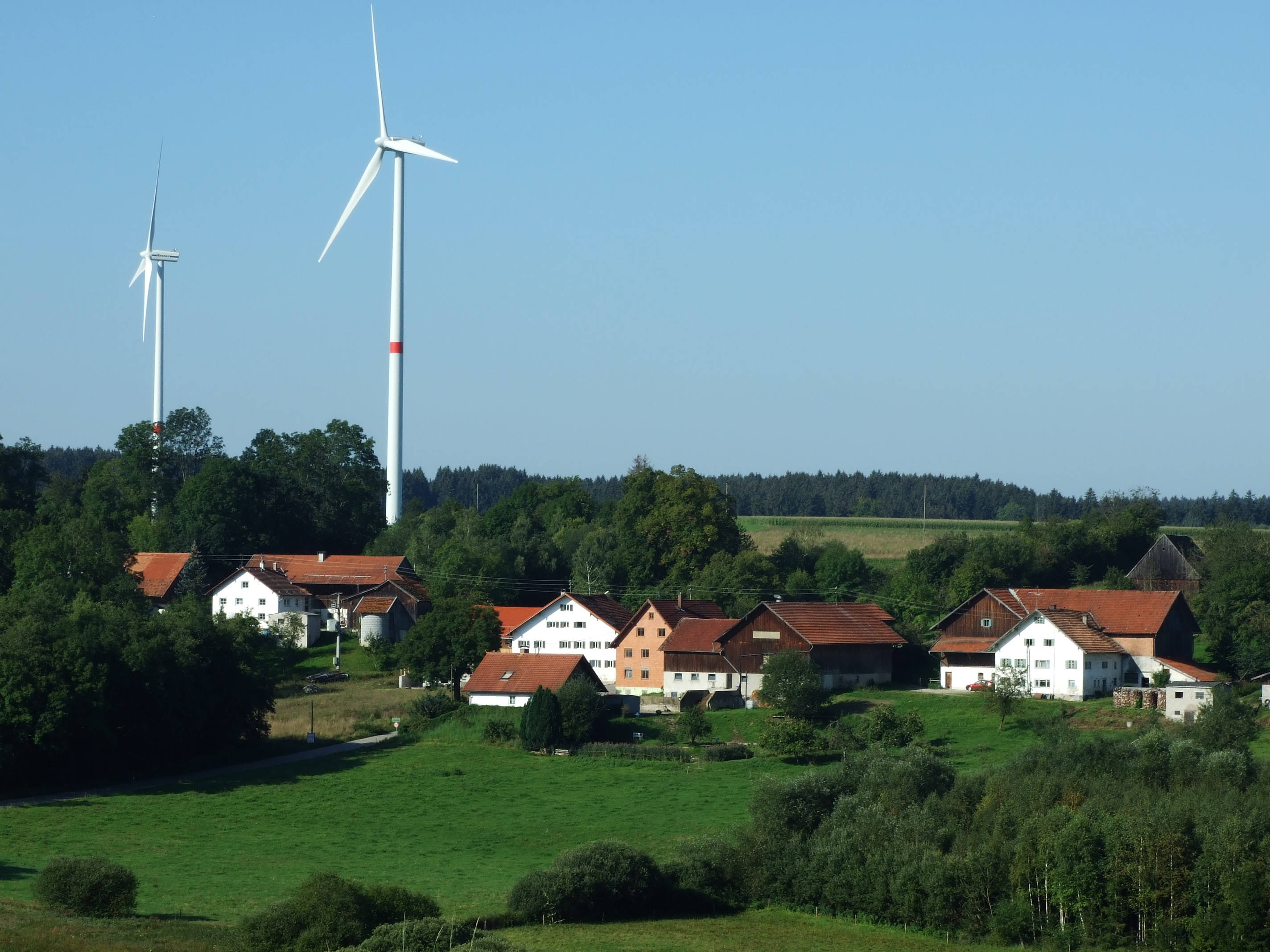 Menhofen, Denklingen, Germany